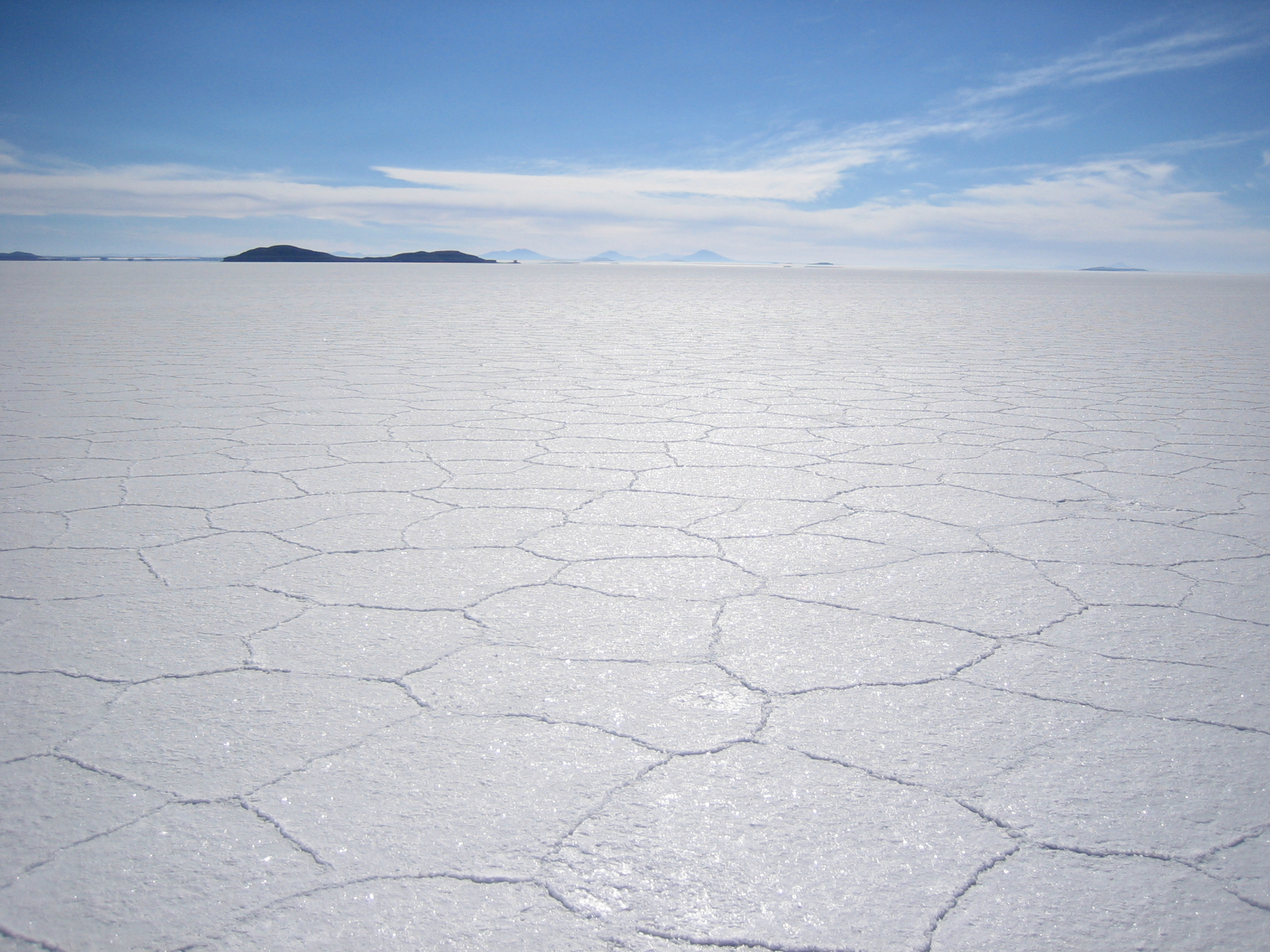 Salar de Uyuni, Bolivia